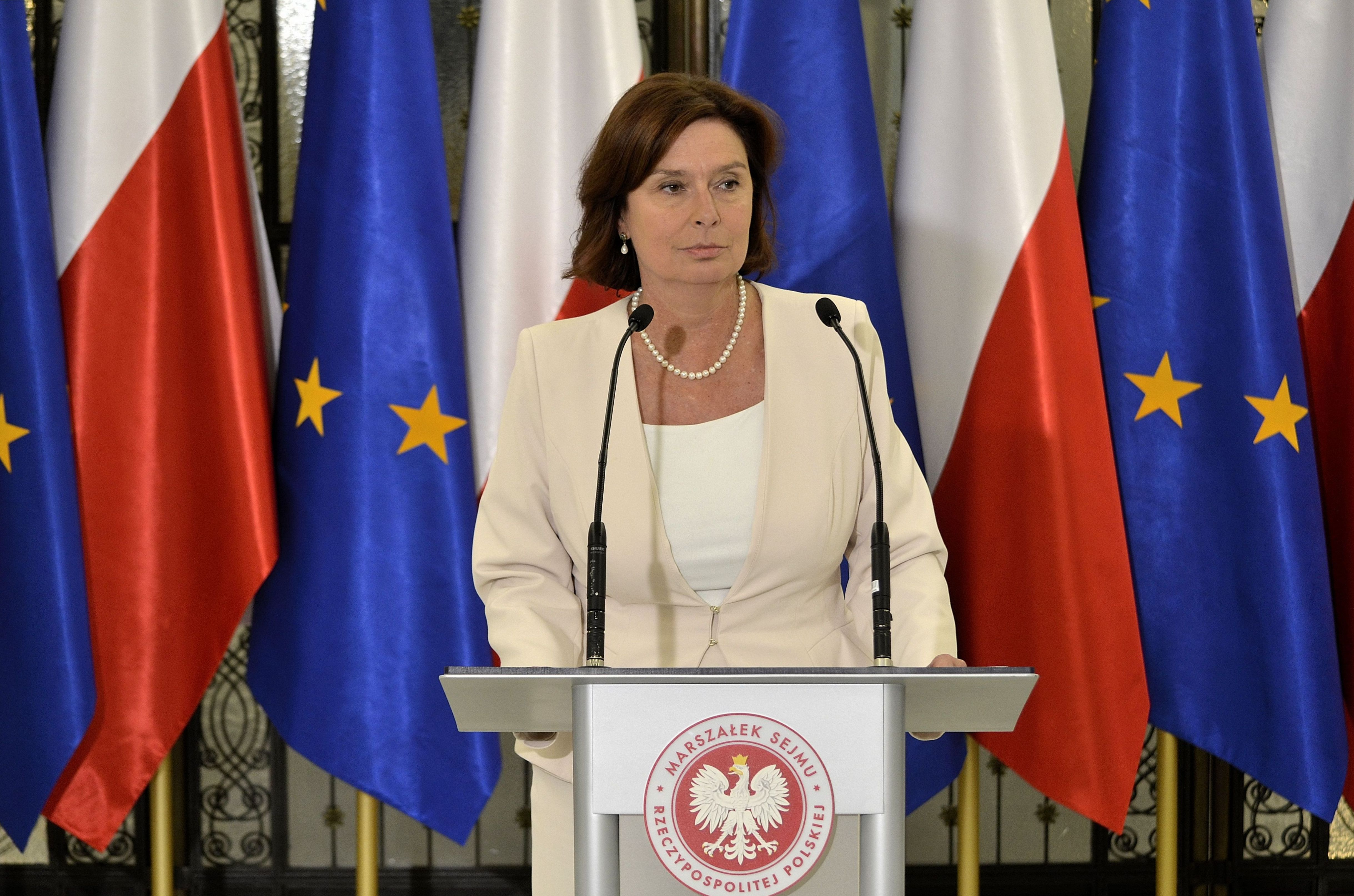 Marszałek Sejmu Małgorzata Kidawa-Błońska podczas brifingu prasowego przed 100. posiedzeniem Sejmu